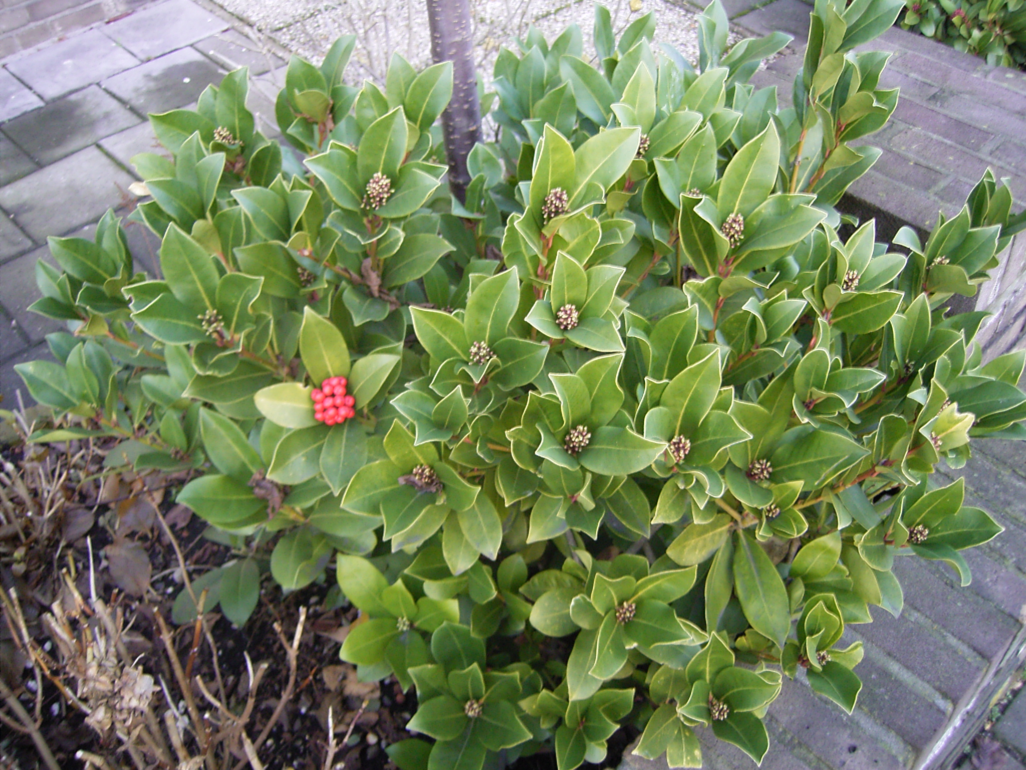 Skimmia japonica photo made by me in dec 2004.